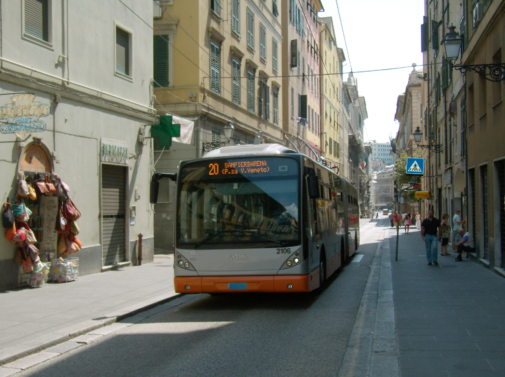 Vettura filoviaria 2106 dell'AMT di Genova, in servizio sulla linea 20 diretta al capolinea di Sampierdarena, in via Balbi